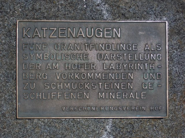 Im Hofer Stadtpark Theresienstein gibt es ein Kunstwerk „Katzenaugen“. Diese Tafel beschreibt es.